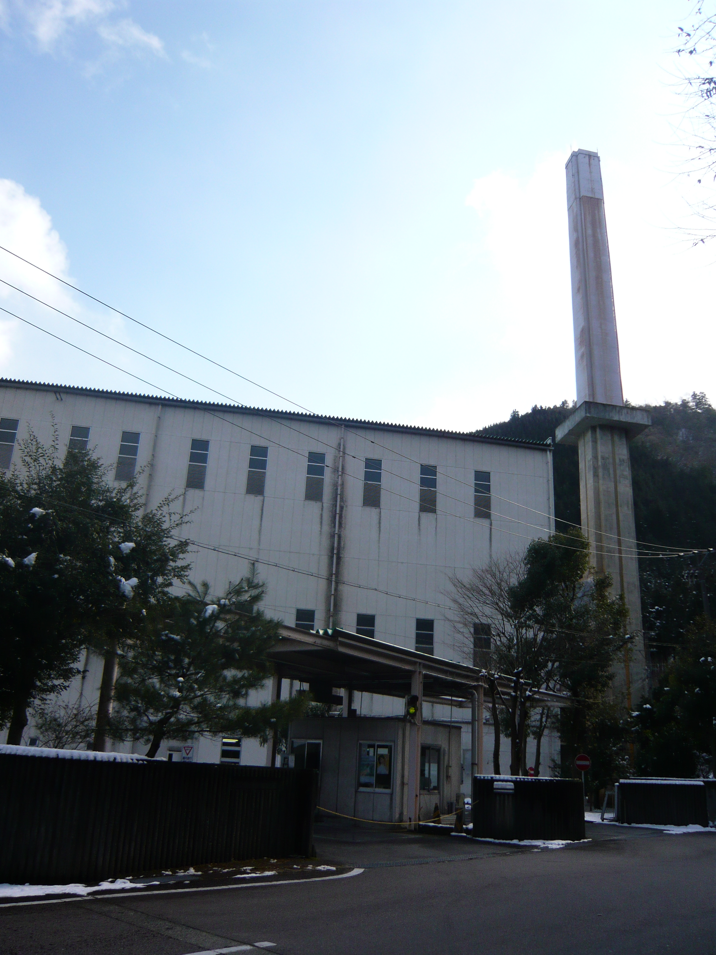 Kakebora Plant（掛洞プラント）,Gifu,Gifu,Japan（岐阜県岐阜市）で撮影。